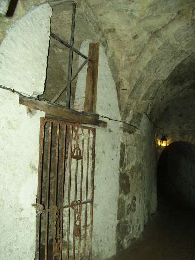 Auteur: RPLl - juin 2006